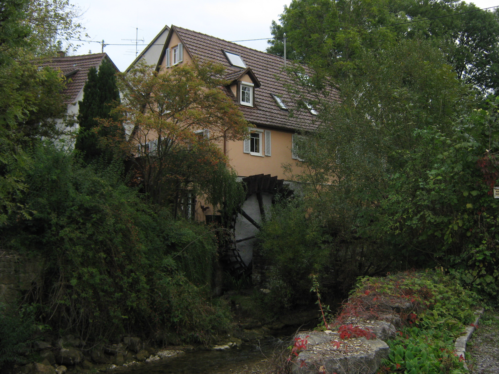 Das bestehende Gebäude der Gipsmühle Mössingen wurde 1836 an einer Stelle an der Steinlach erbaut, wo bereits Flurnamen und Eintragungen im Catasterbuch von 1823 auf Vorgängerbauten mit Mühlbetrieb hinweisen.